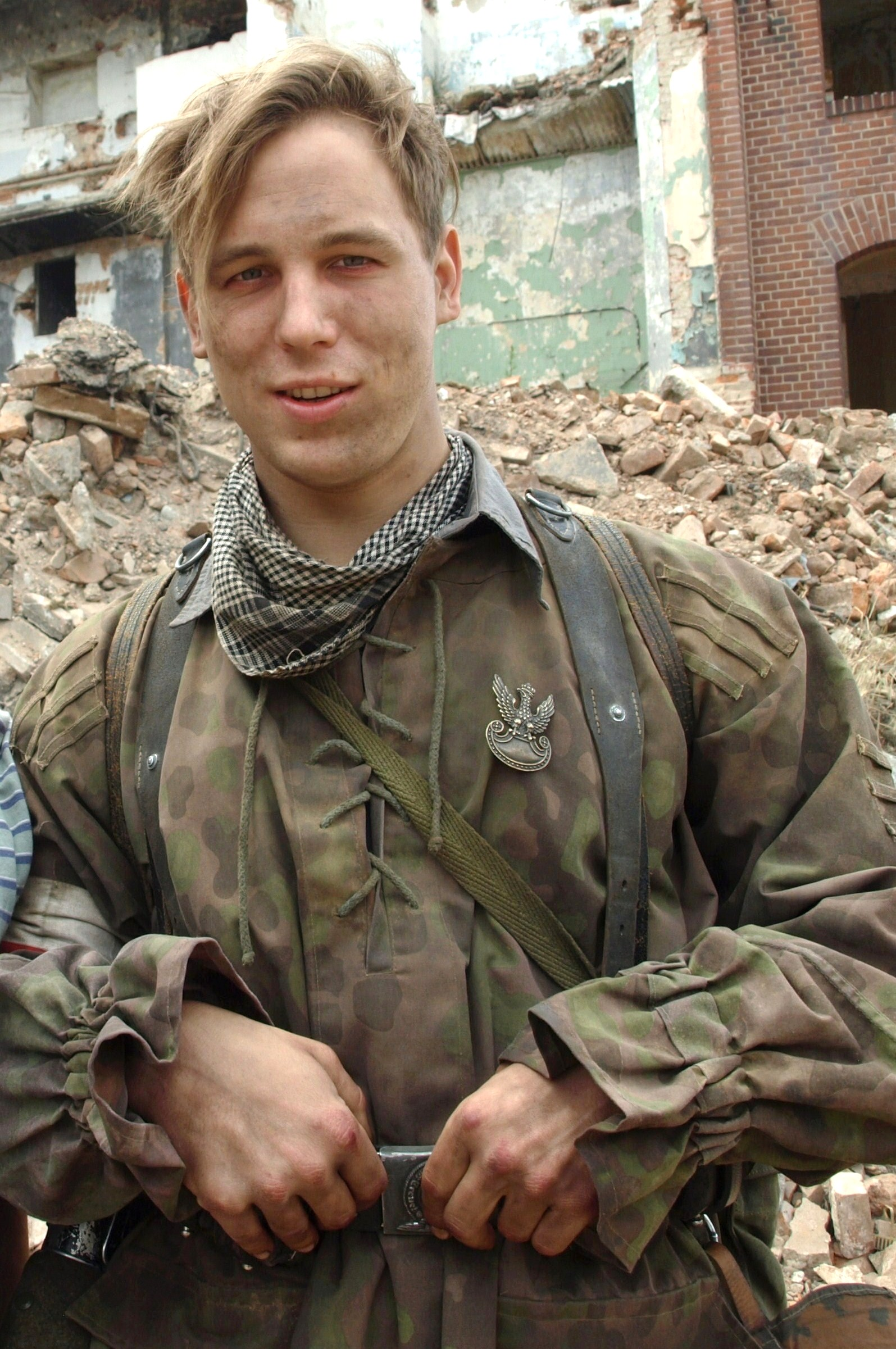 Stefan Pawłowski na planie serialu "Czas honoru".